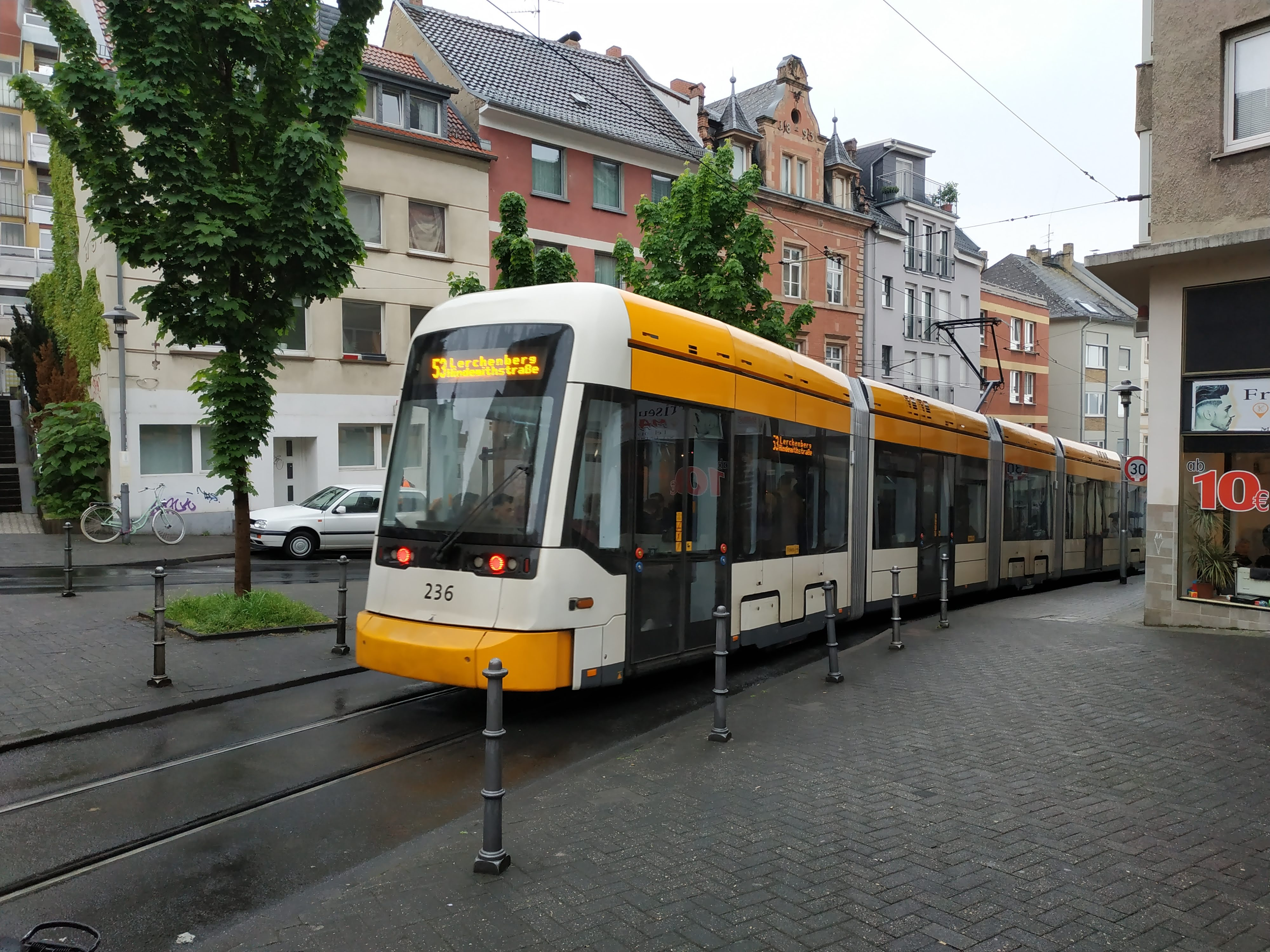 Variobahn du réseau de tramway de Mayence